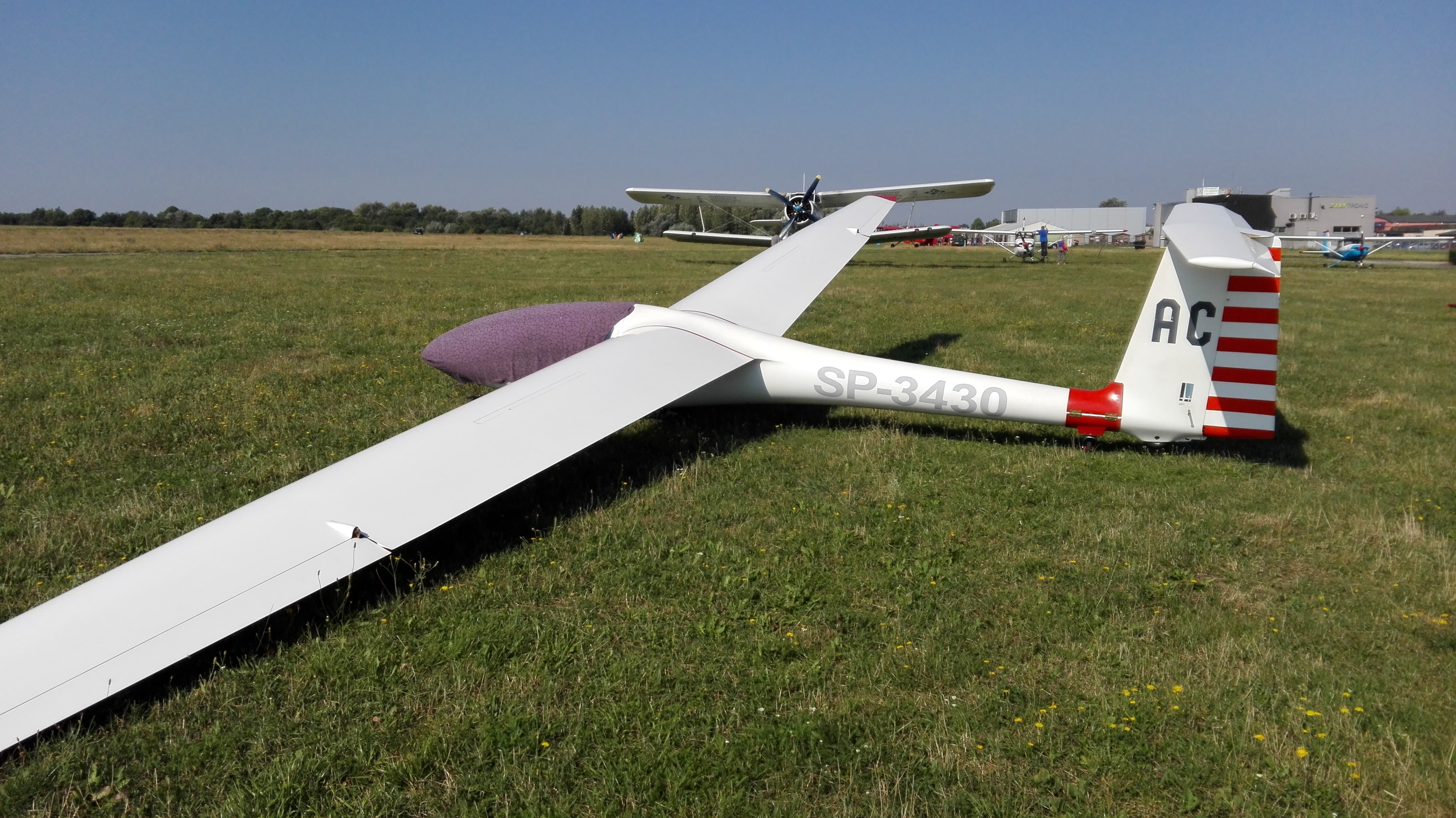 Statki powietrzne: SZD-51 Junior SP-3430(AC), An-2 SP-AOB, Cessna 172 Skyhawk H SP-FLT, Cessna 150 SP-KNC — lotnisko Gliwice-Trynek